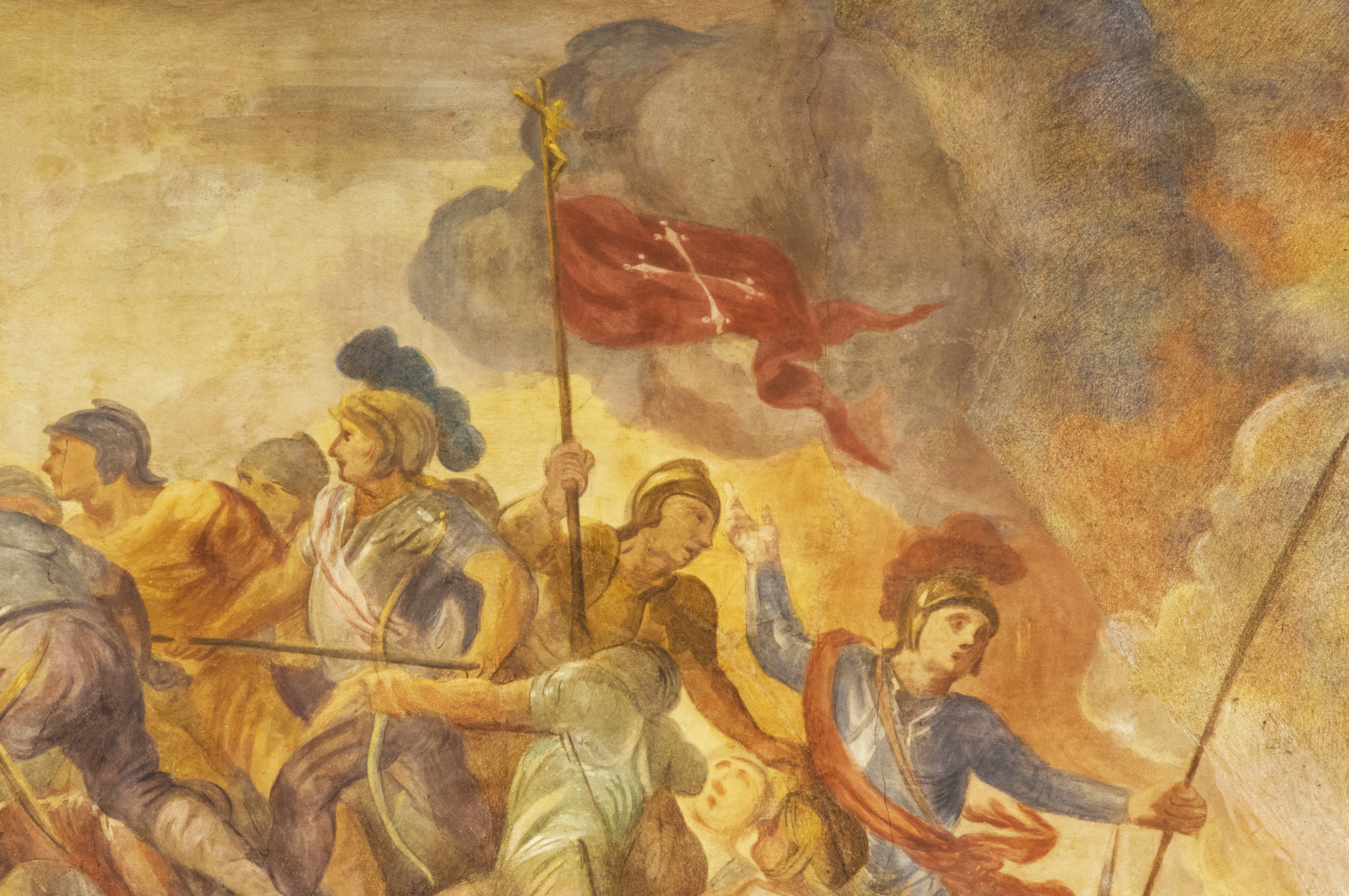 Particolare dell'affresco "I Pisani all'espugnazione di Gerusalemme" di Pier Dandini (Sala delle Baleari, Palazzo Gambacorti, Pisa).